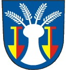 Znak obce Ústí (okr. Přerov)